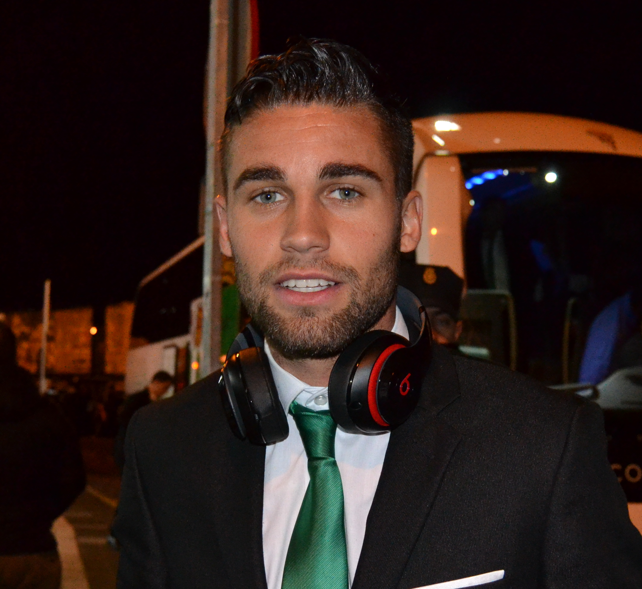 O futbolista Fausto Rossi